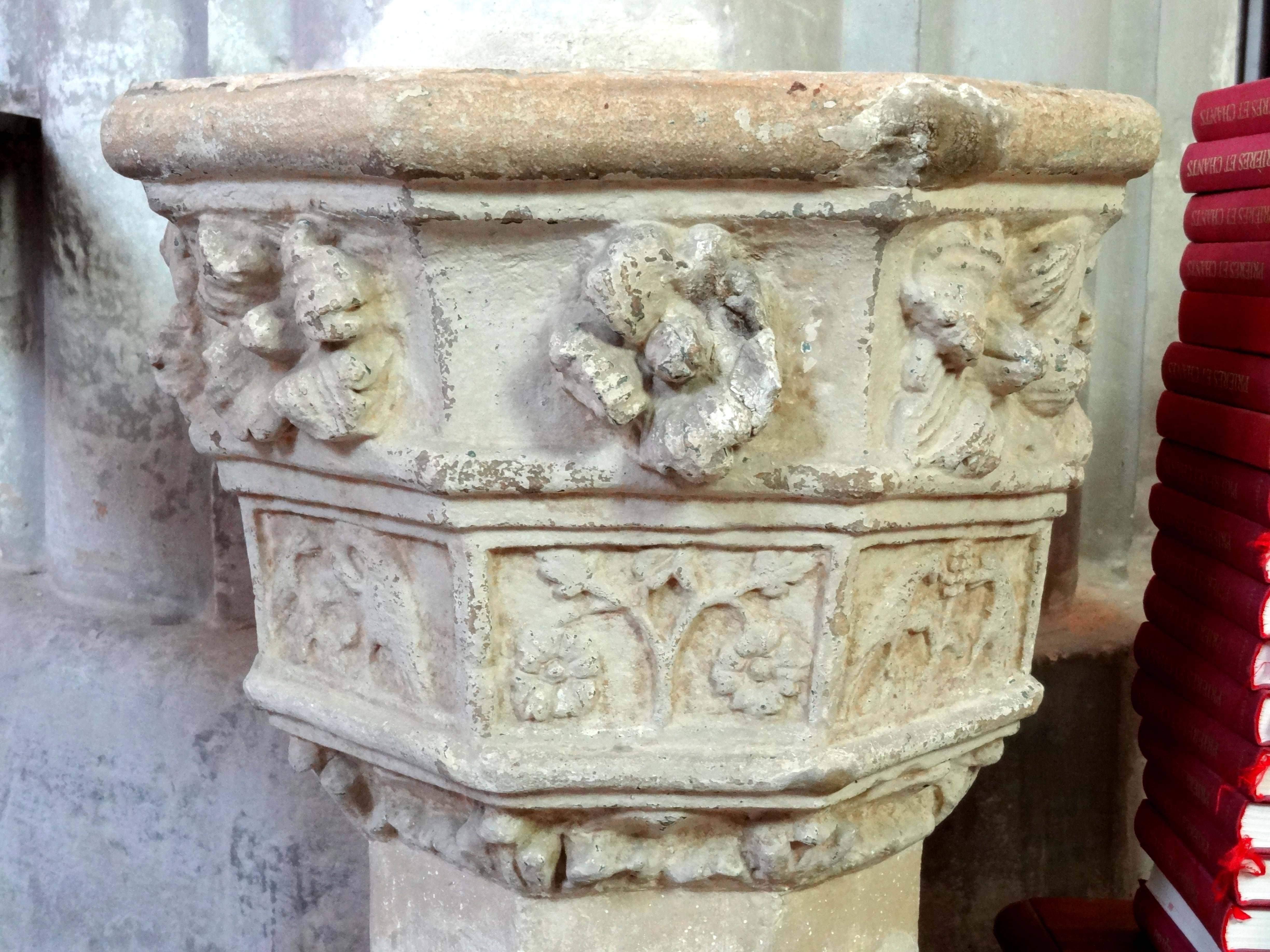 Bénitier Renaissance.